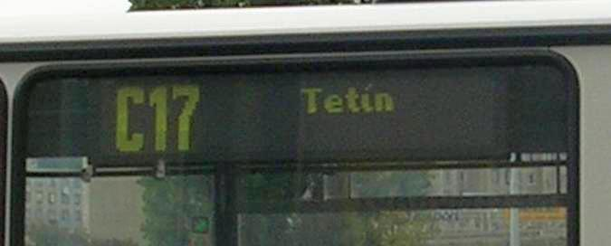 Boční informační panel na autobuse v trase Beroun–Tetín. Středočeská integrovaná doprava.